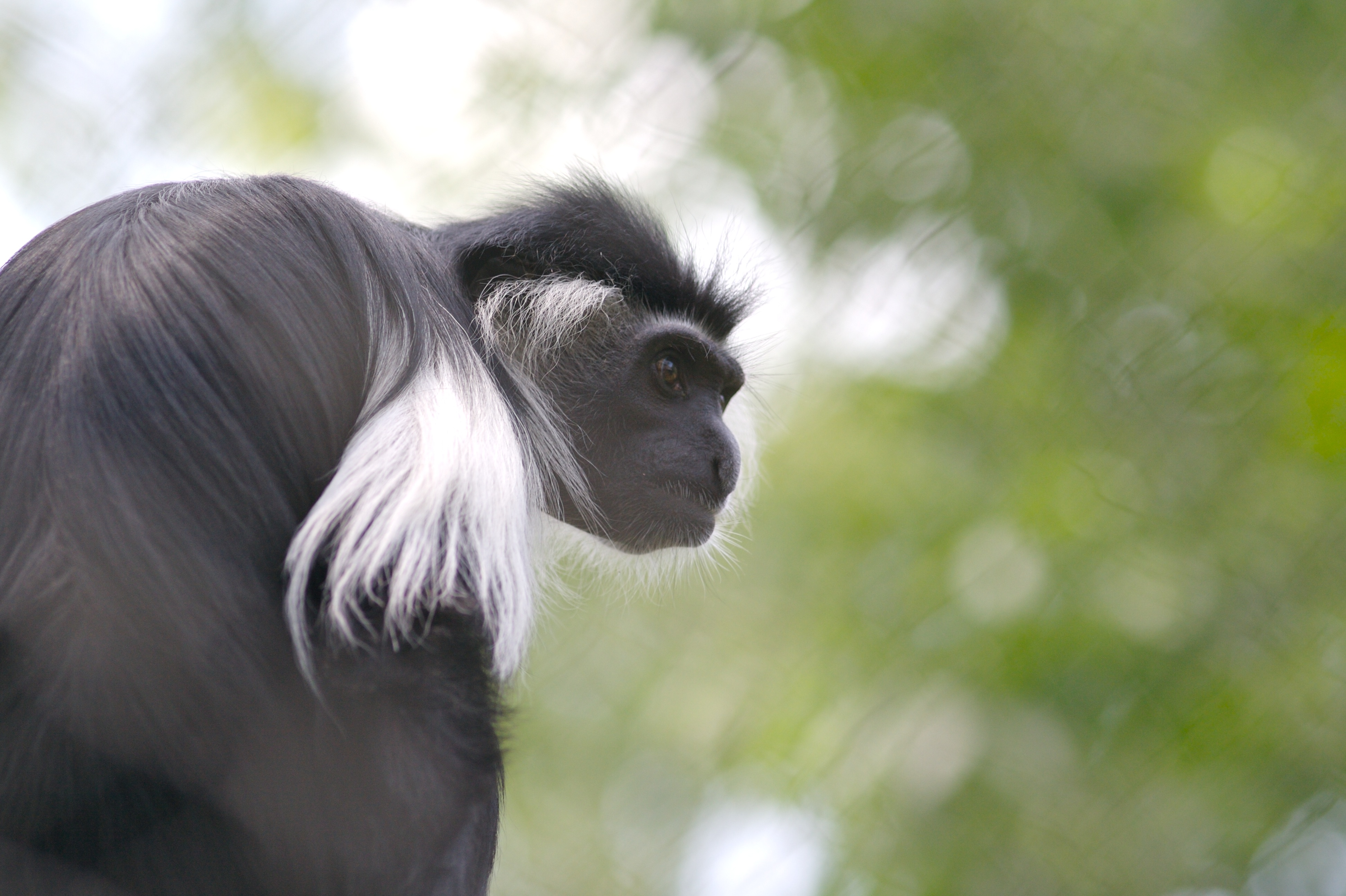 Angola Colobus (Colobus angolensis) in Columbus Zoo